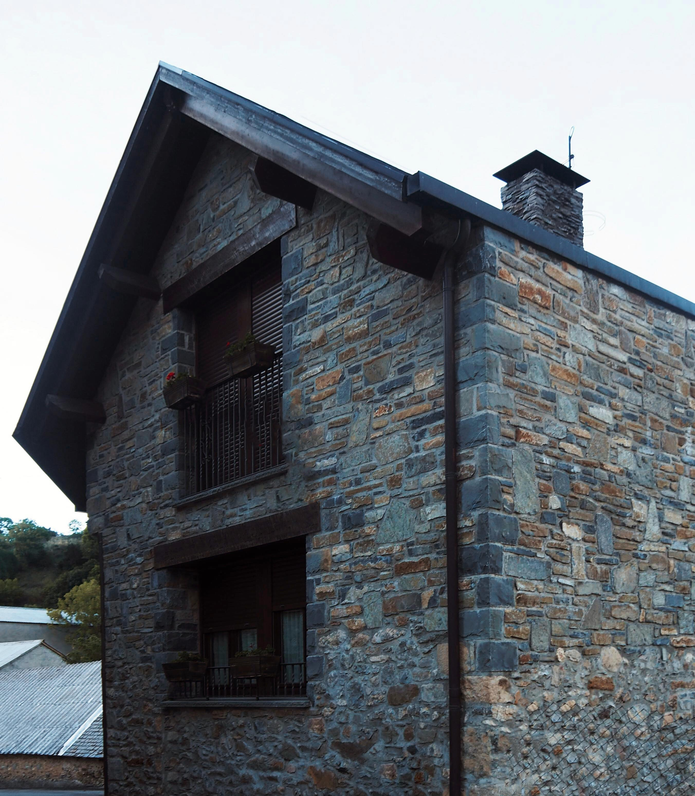 Ejemplo de Borda rehabilitada en Hoz de Jaca